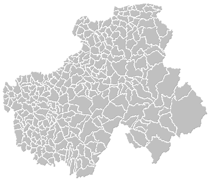 Carte du département de la Haute-Savoie, en France, représentant le découpage territorial des différentes communes qui la compose.